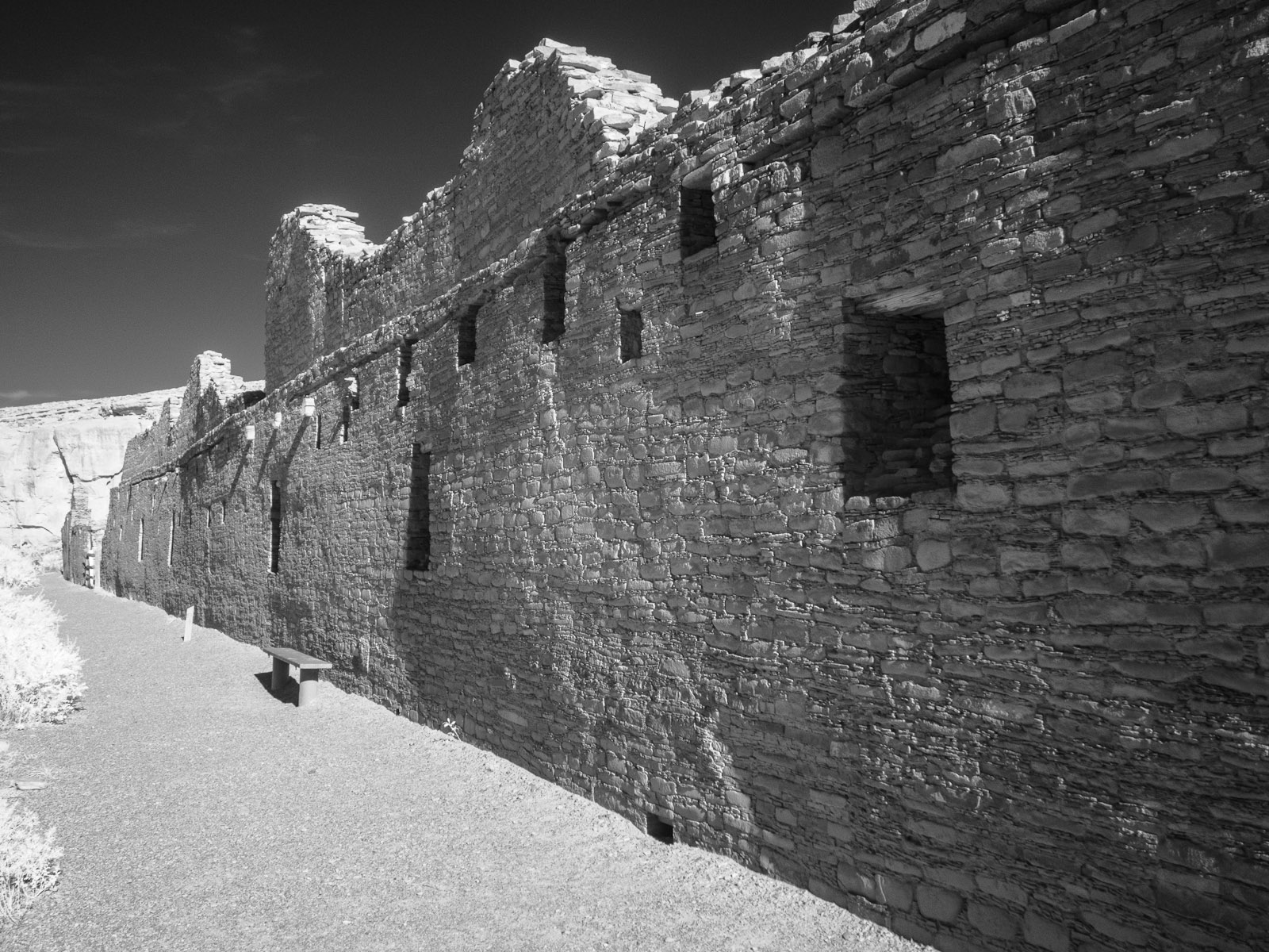 Chaco Culture NHP